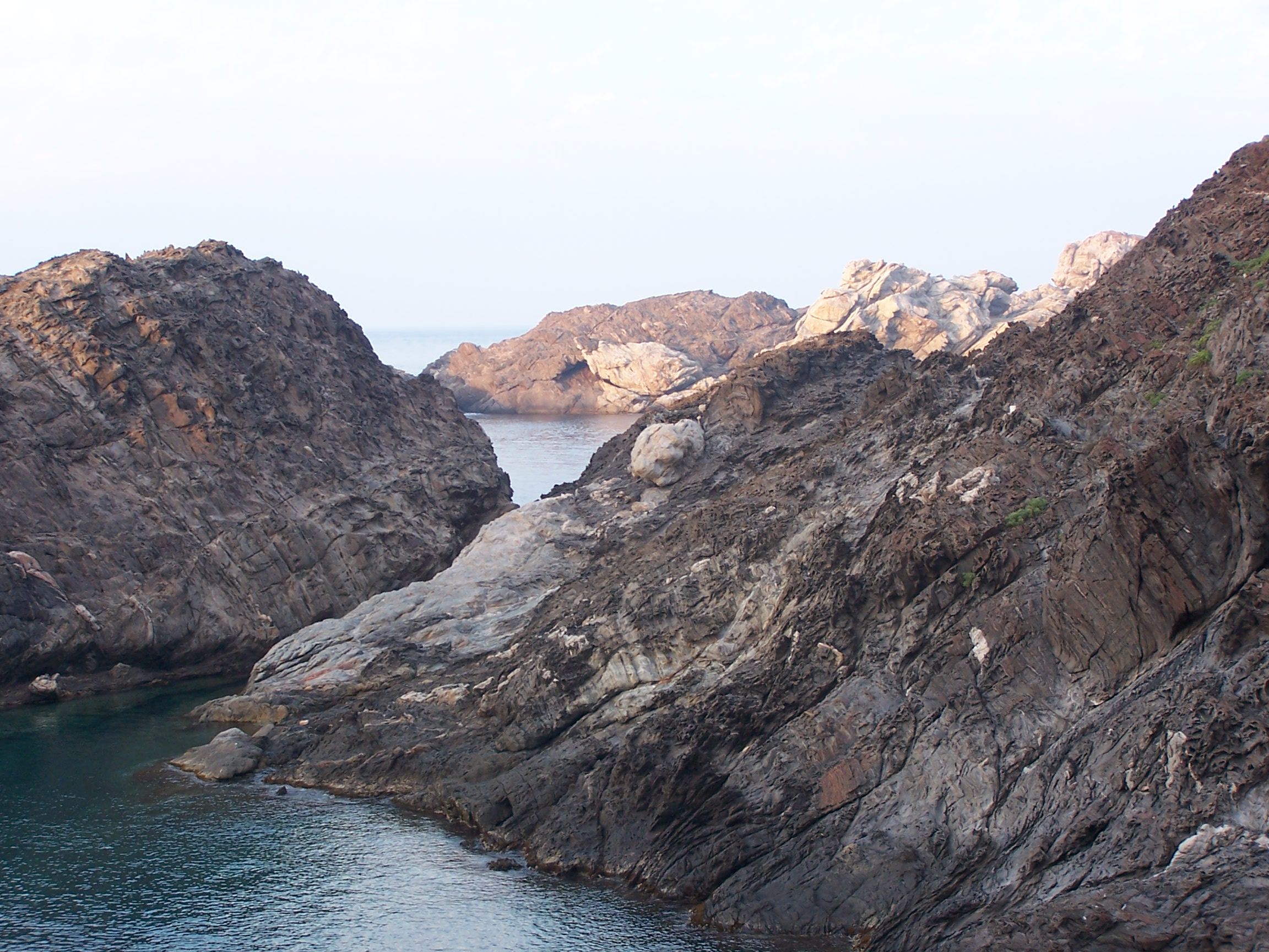 Zelf gemaakt, Spanje 18 juli 2004